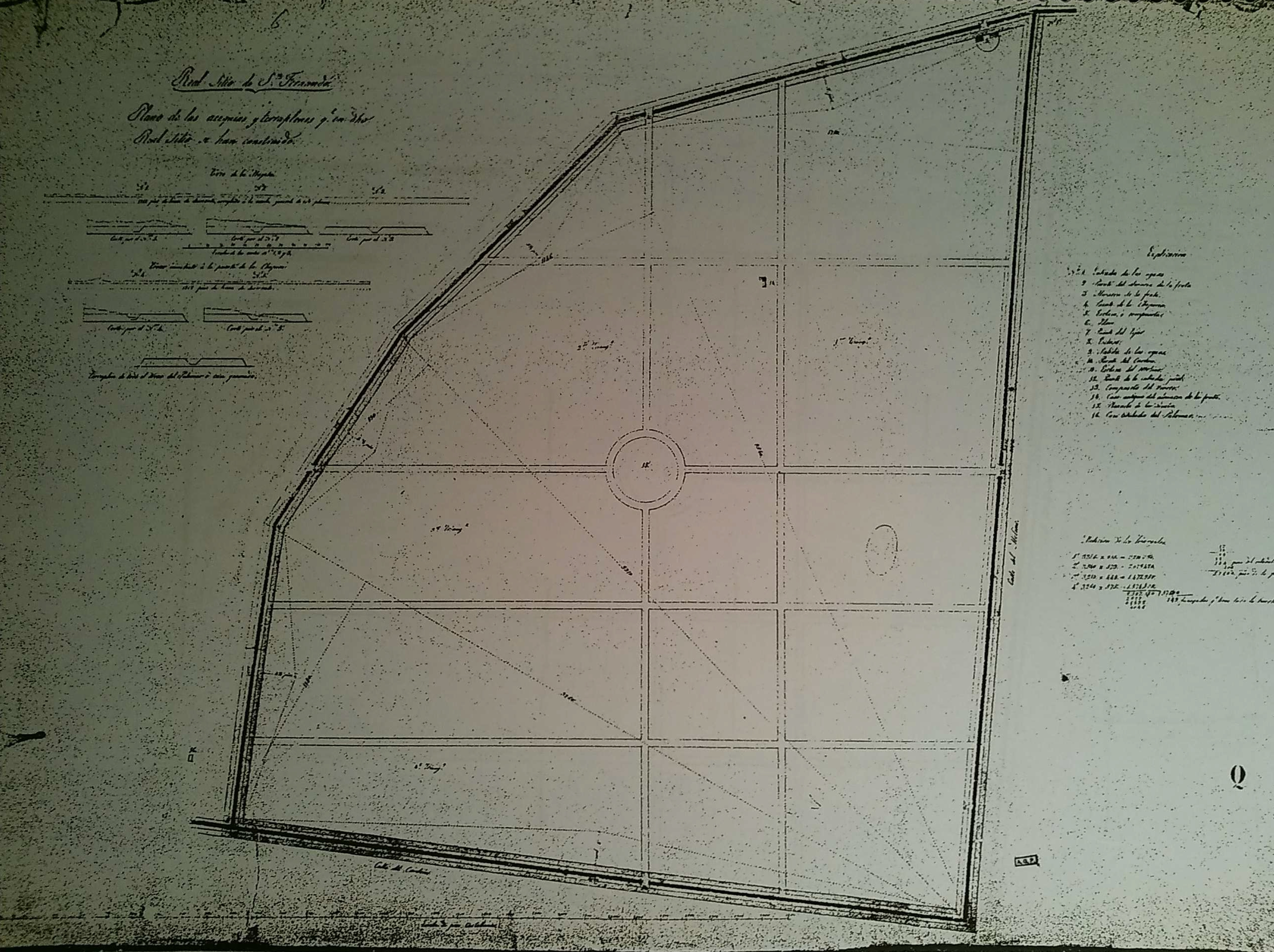 Plano nº 3.454 de levantamiento planimétrico.